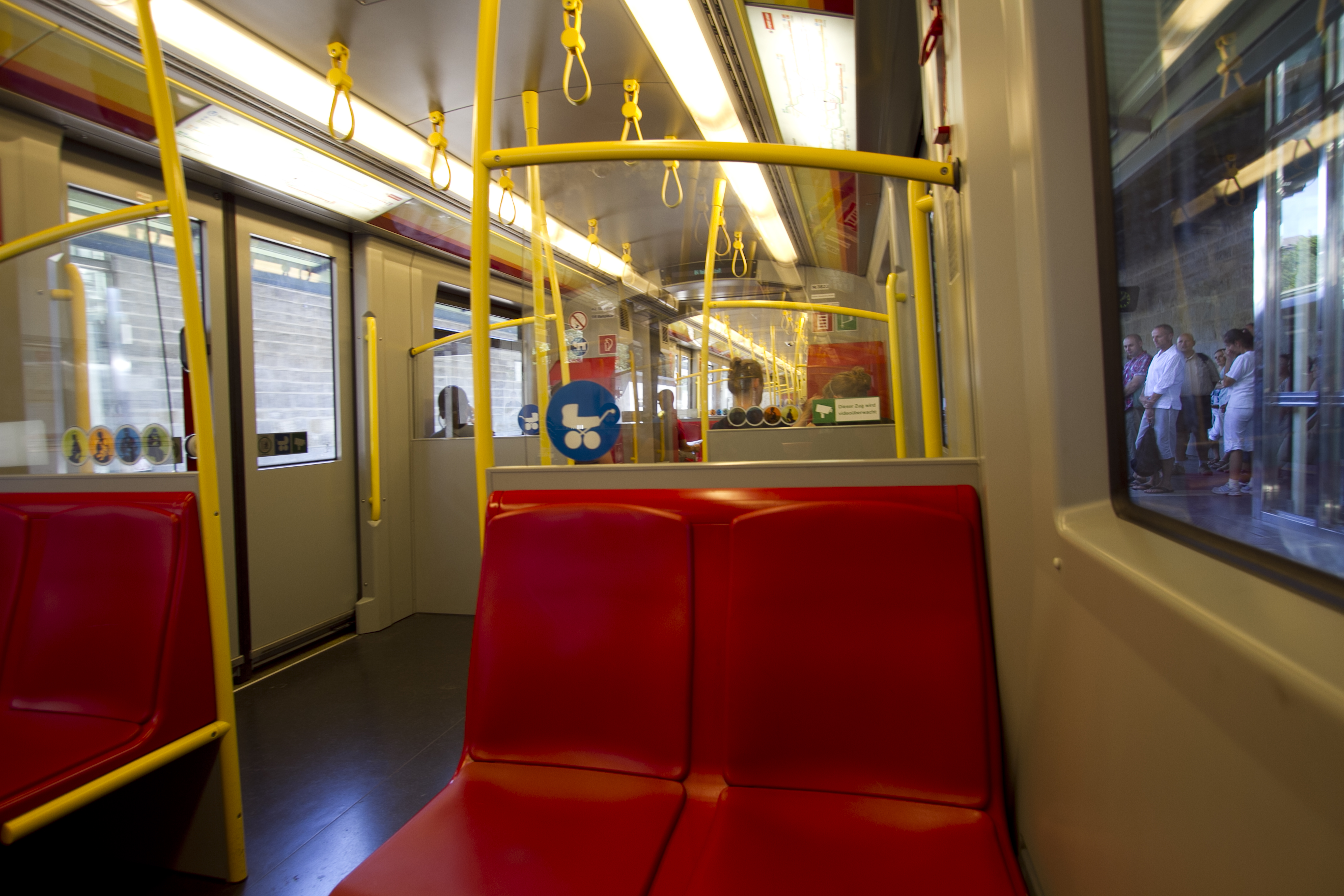 Vienna, Austria